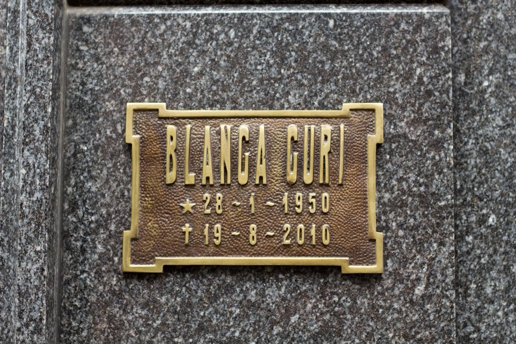 Tumba Blanca Curi, Cementerio de la Recoleta